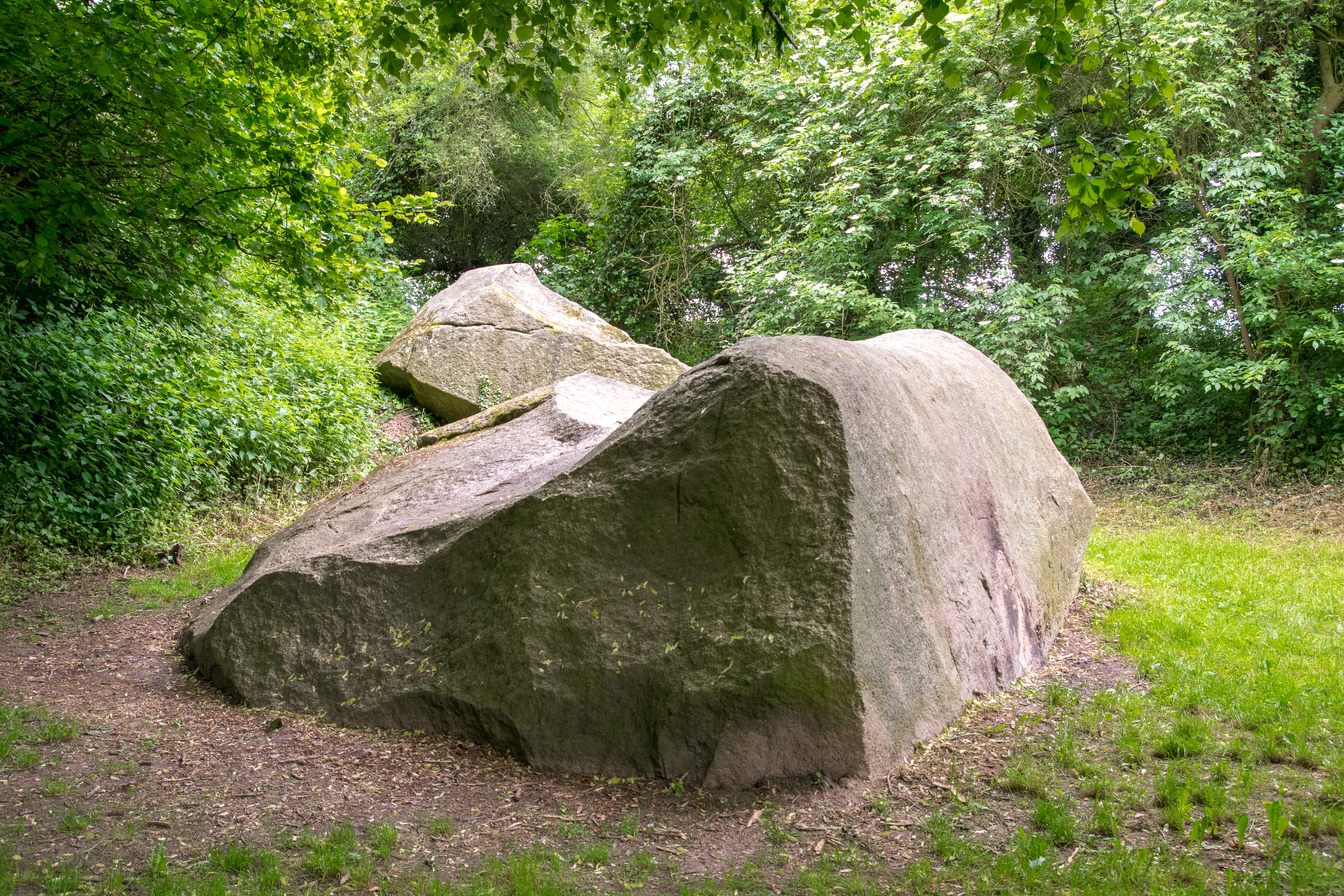 Naturdenkmal Johannissteine mit alter Tongrube, Lage, Kreis Lippe